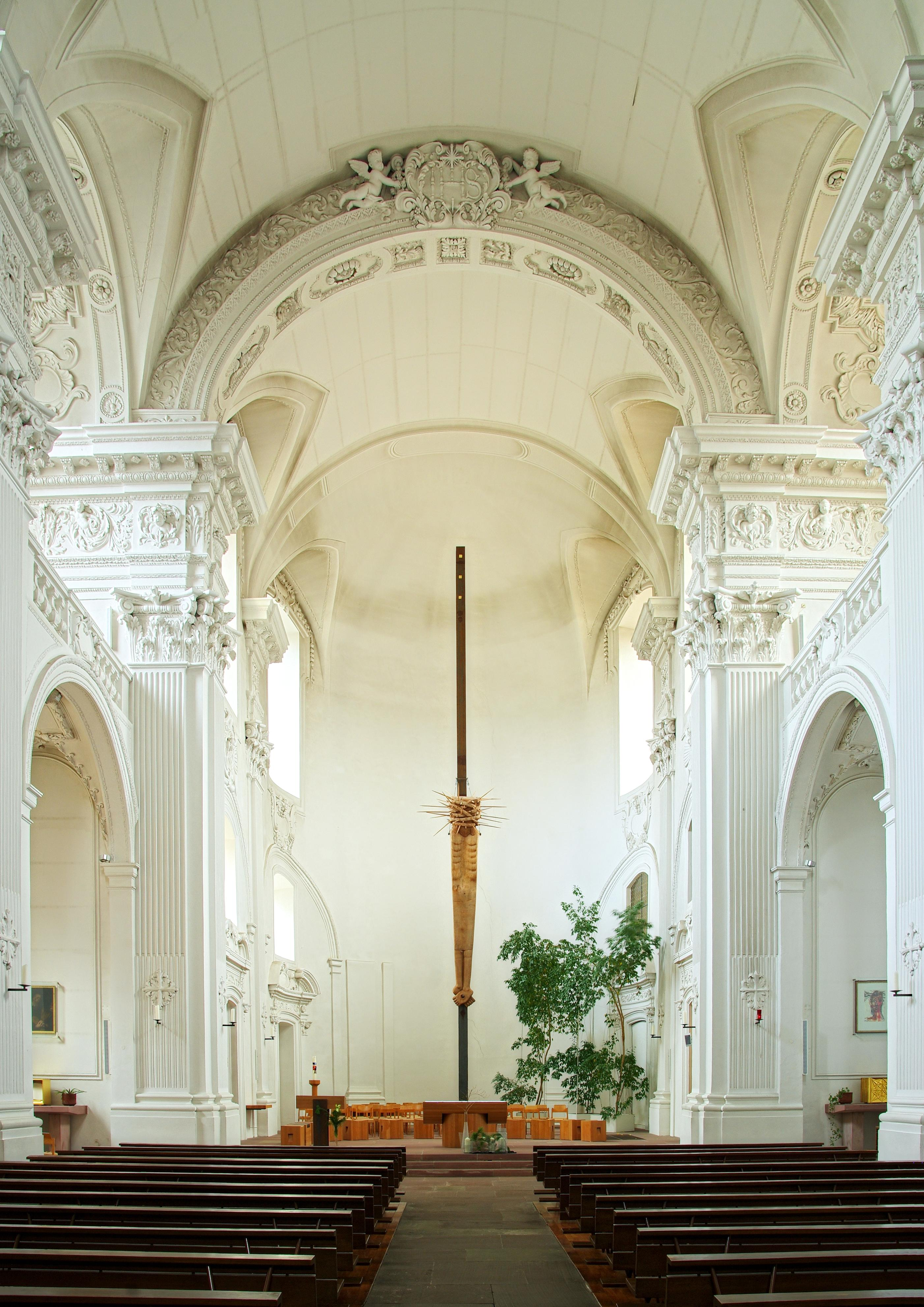 Die Jesuitenkirche in Freiburg auch Unikirche genannt